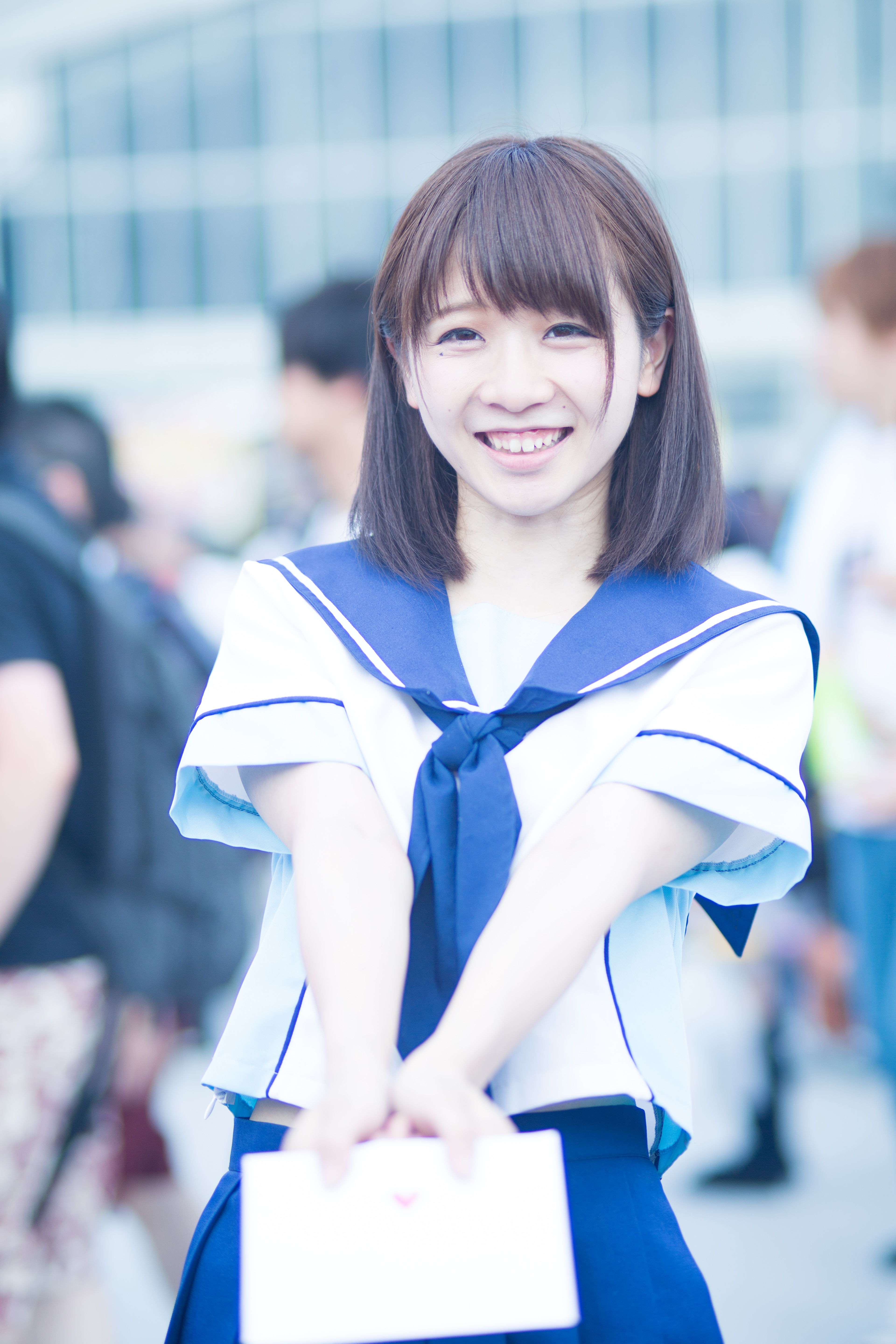 コミックマーケット92 3日目 コスプレイヤー